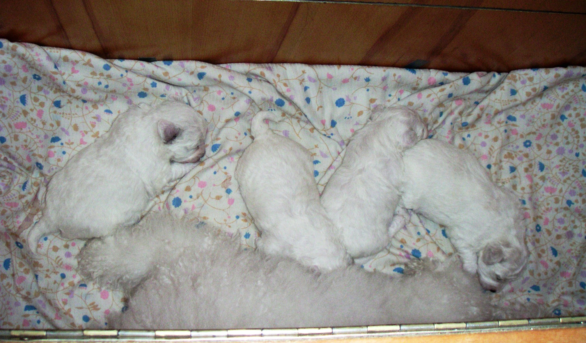 Bichon Frise